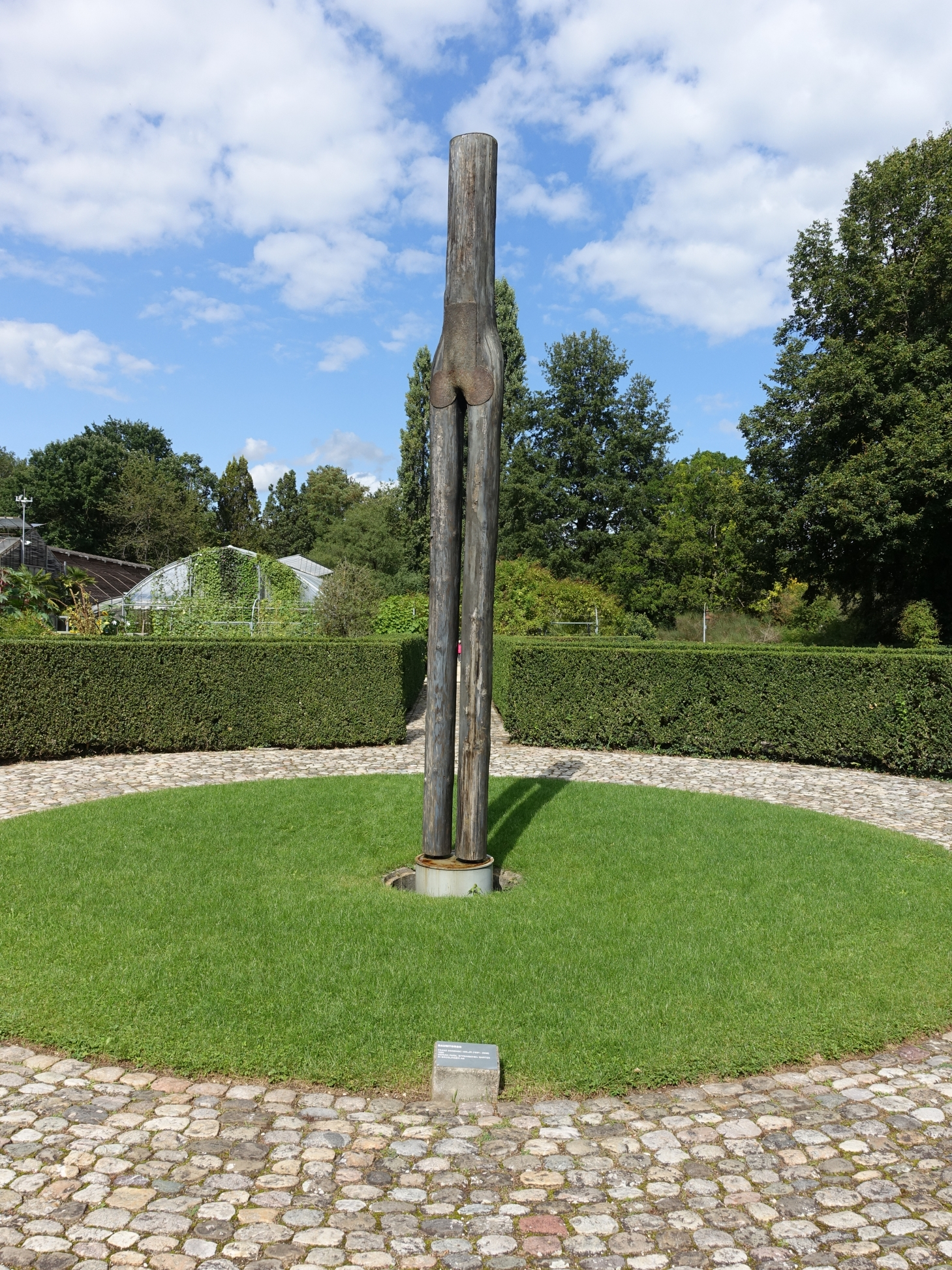 Skulptur, Baumtorso, 1980, auf der Brüglinger Ebene, Merian Park, Basel. Von Franz Eggenschwiler (1930-2000)